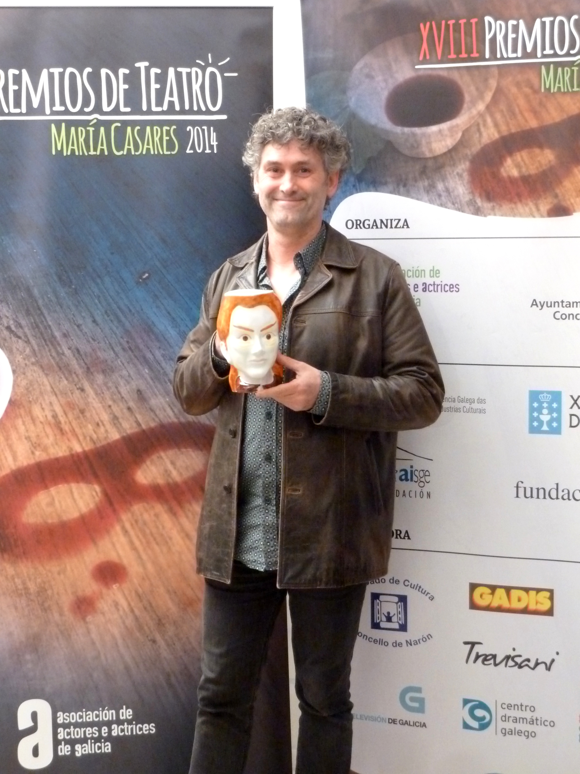 Cándido Pazó na gala dos premios María Casares 2014.